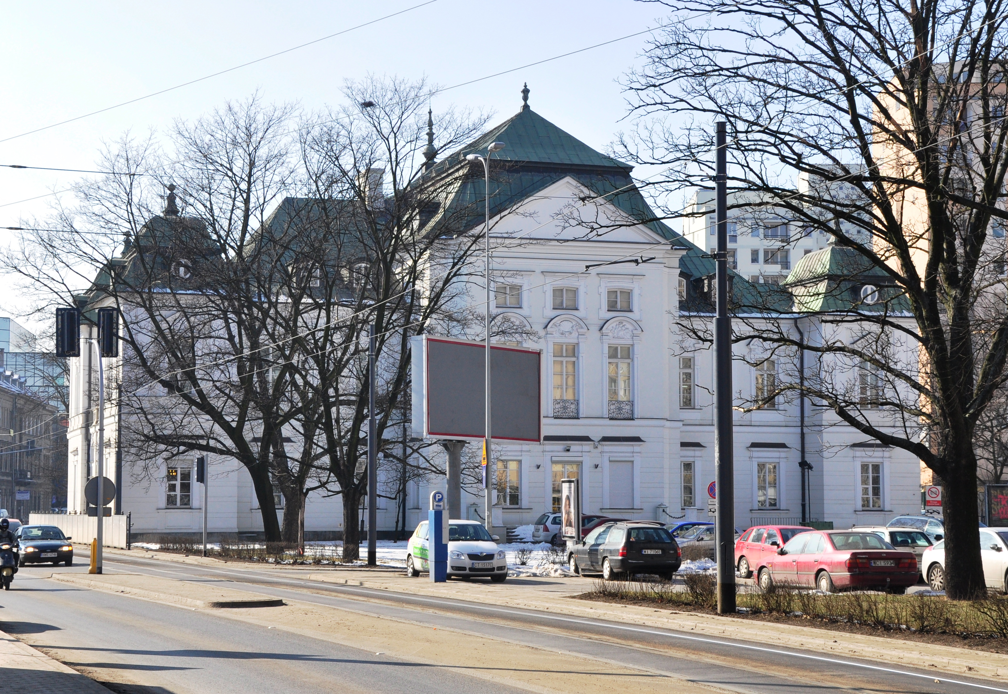 Unabhängigskeitsmuseum Warschau vom Osten